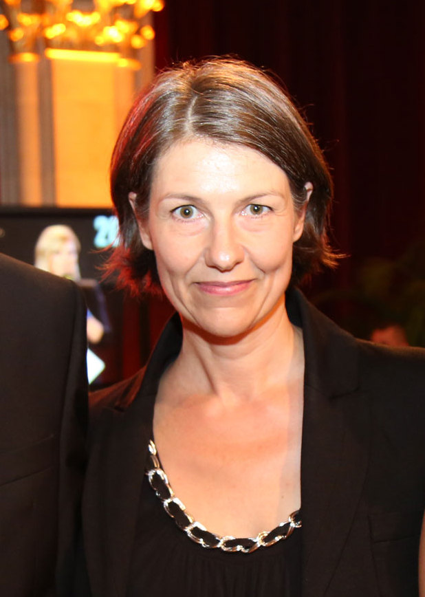 14-ö1-Mittagsjournal-5492